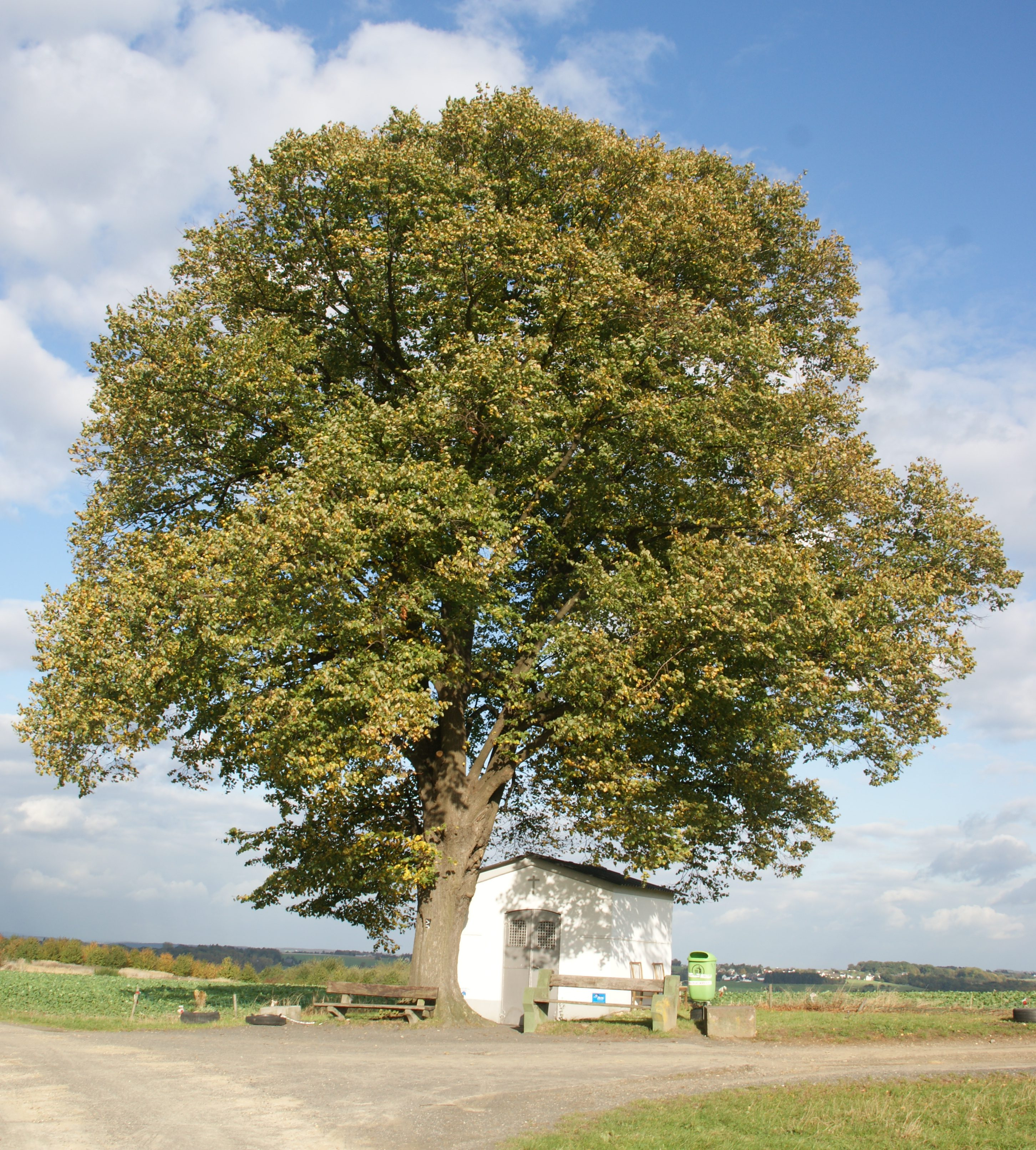 Heiligenhäuschen/Wegekapelle auf dem Hartenberg bei Hartenberg, Königswinter (